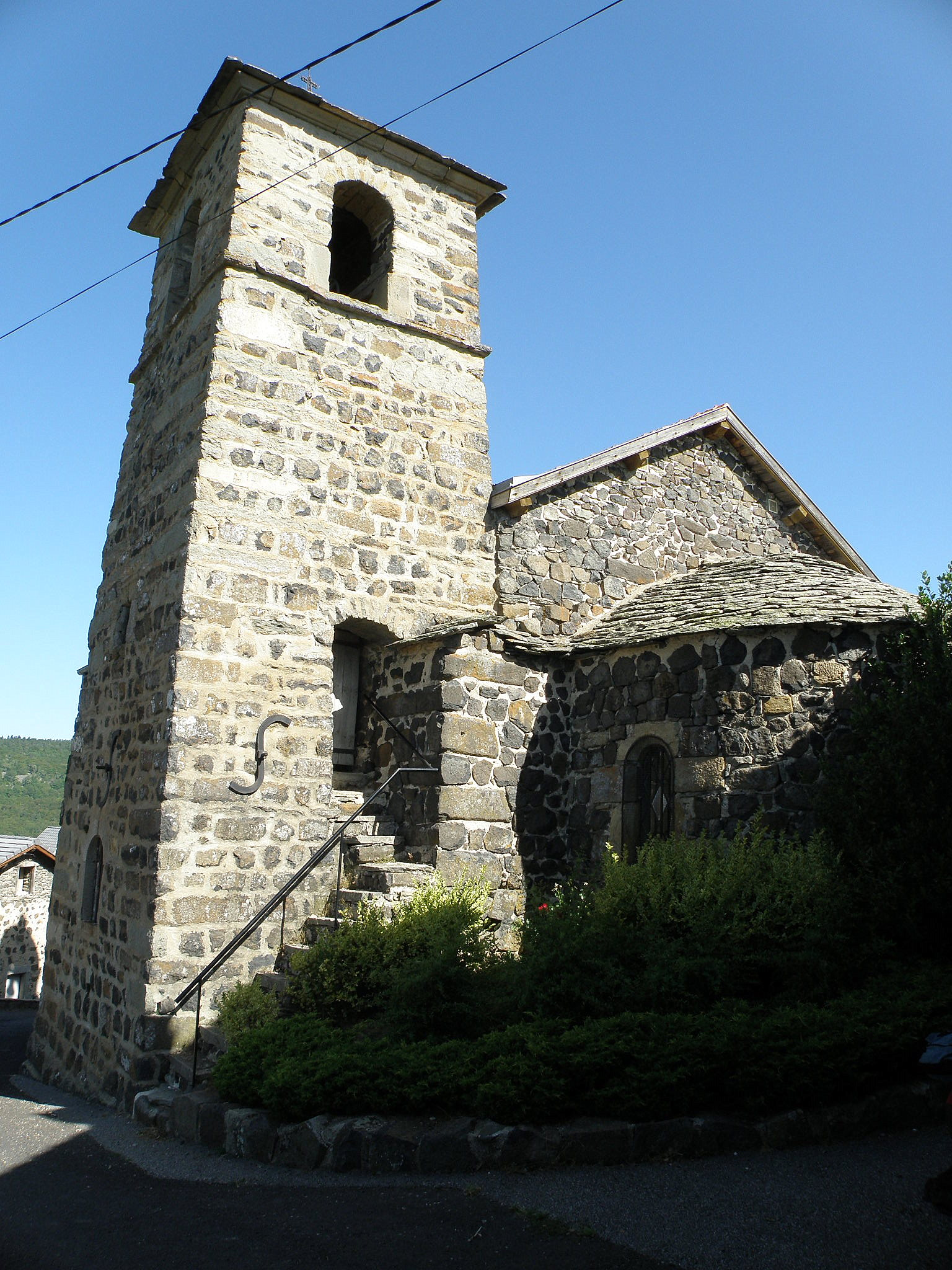 Mézères, dép. de la Haute-Loire, France (Auvergne). Église: choeur et clocher.